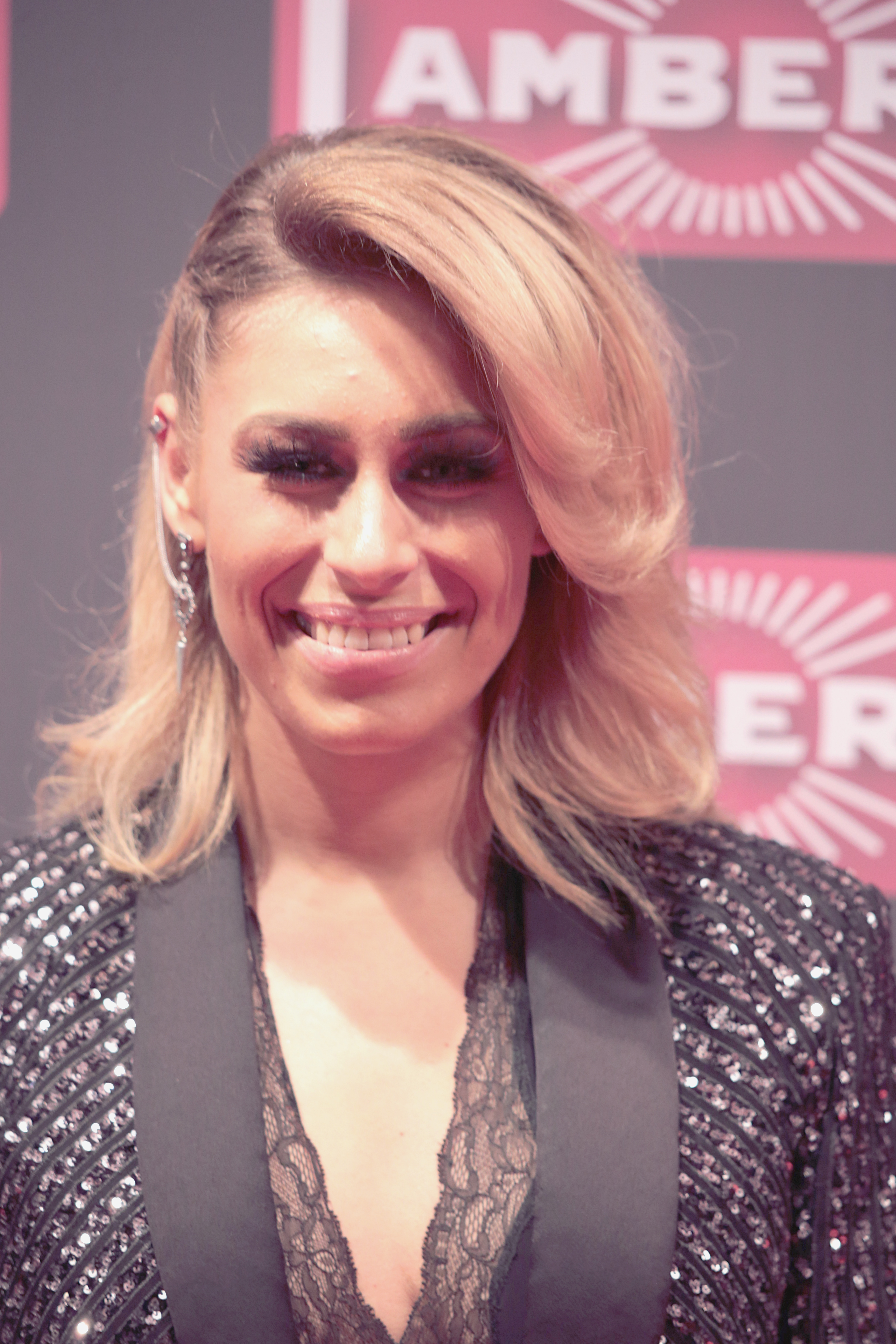 Linda Teodosiu bei der Lambertz Monday Night 2018.